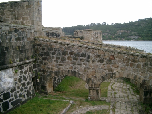 Castelo de San Filipe en Ferrol